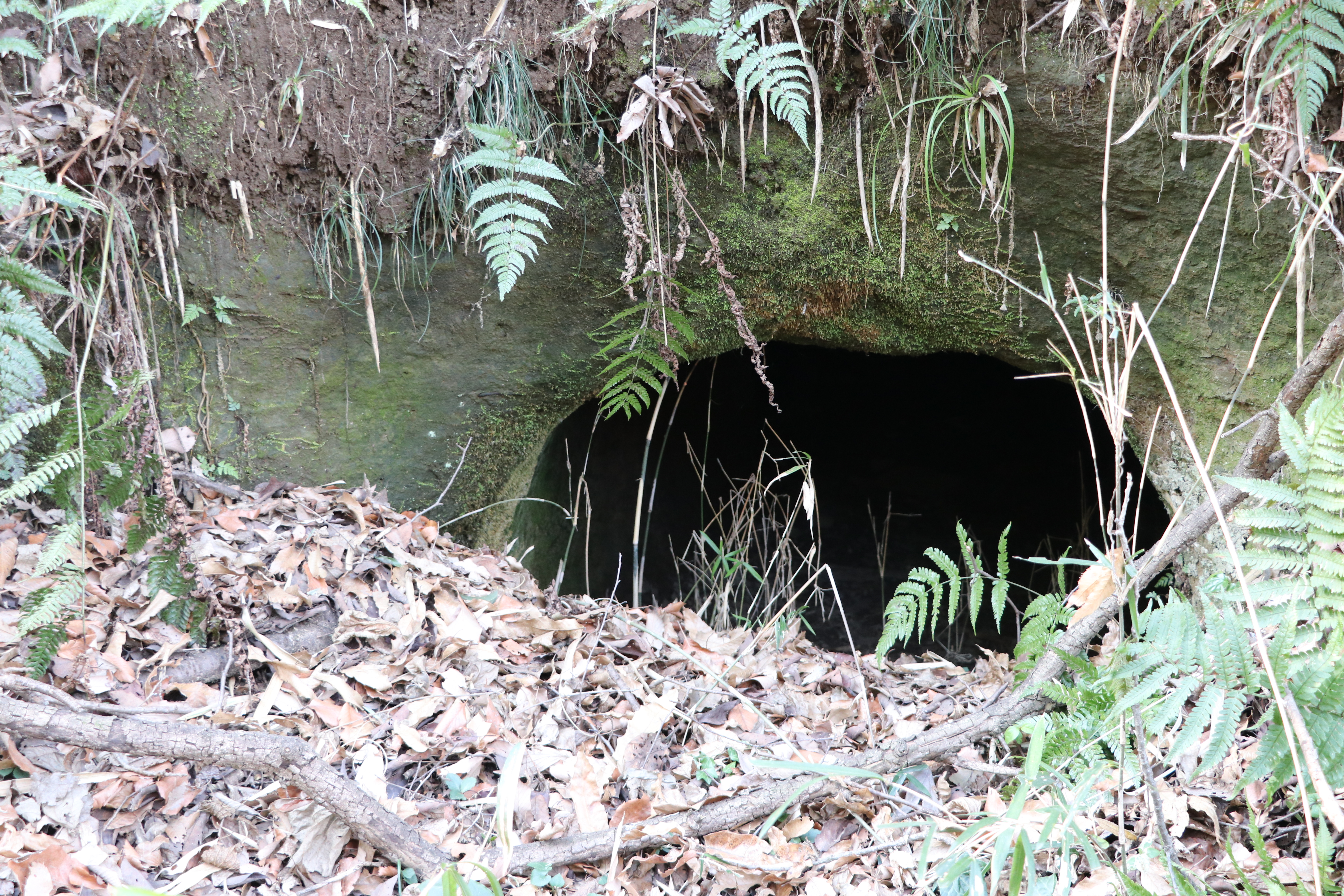 生田緑地にある長者穴横穴墓群